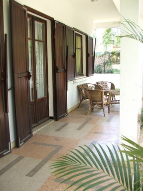 Varangue d'une maison de type SATEC au Tampon, sur l'île de la Réunion